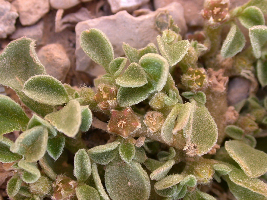 Aizoon canariense L. (חיעד קנרי), Judean Desert, Israel, December 8, 2006.